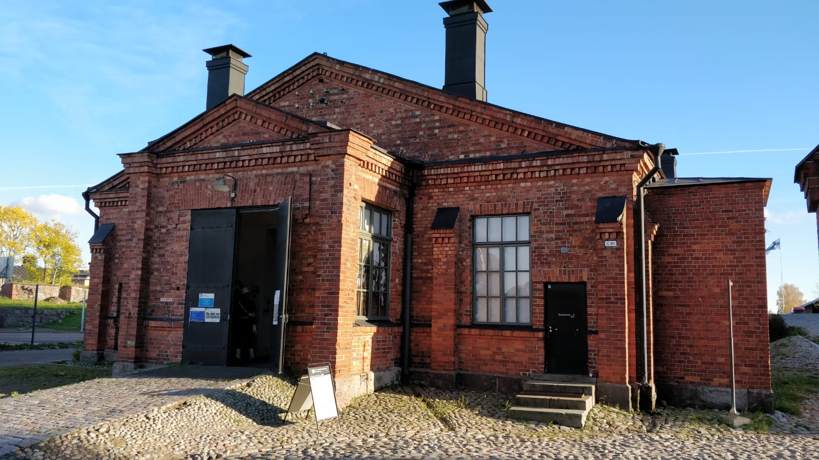 Tykistömaneesi